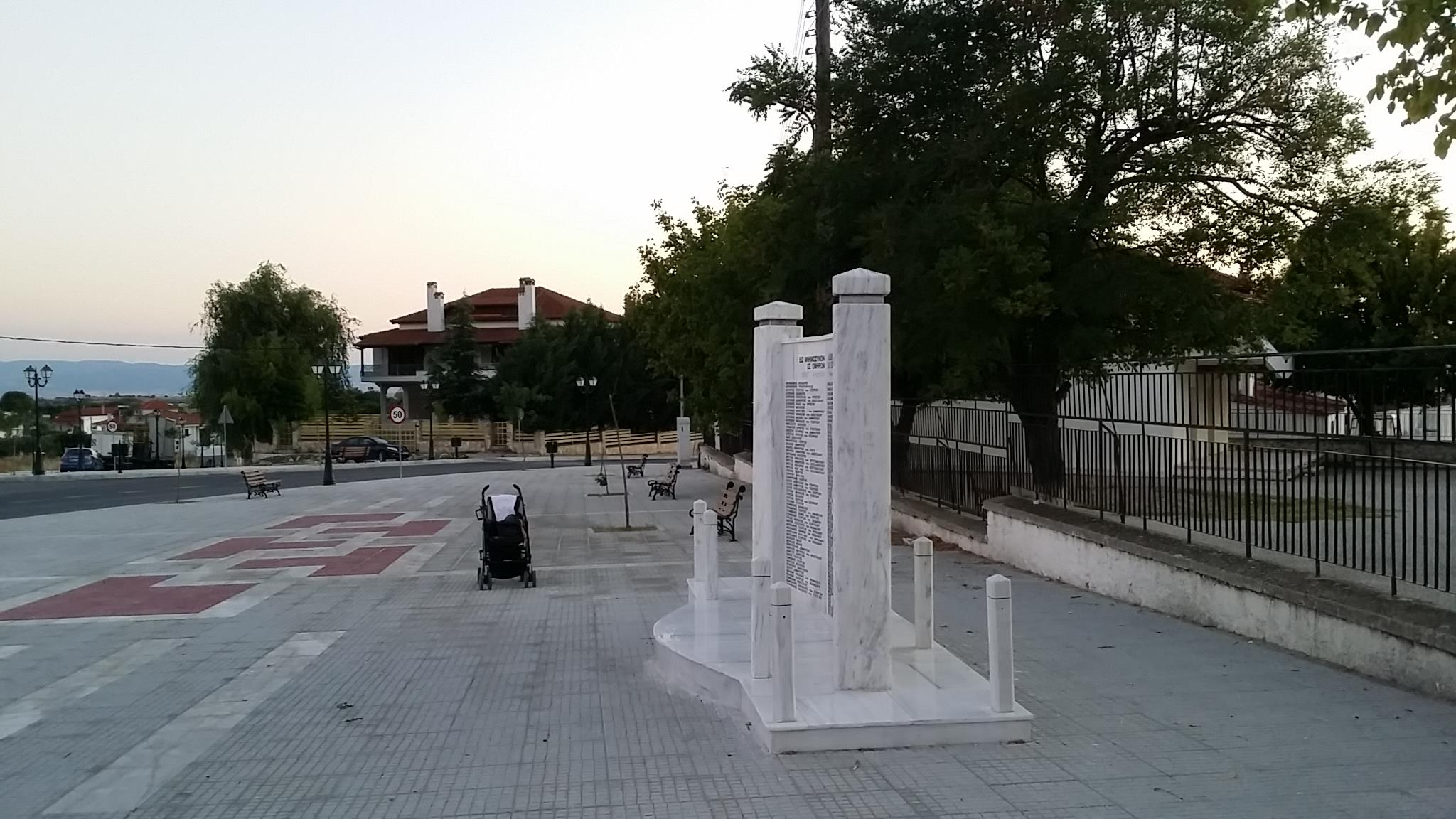 Μνημείο πεσόντων στον Μακεδονικό Αγώνα στην πλατεία του Νέου Σουλίου